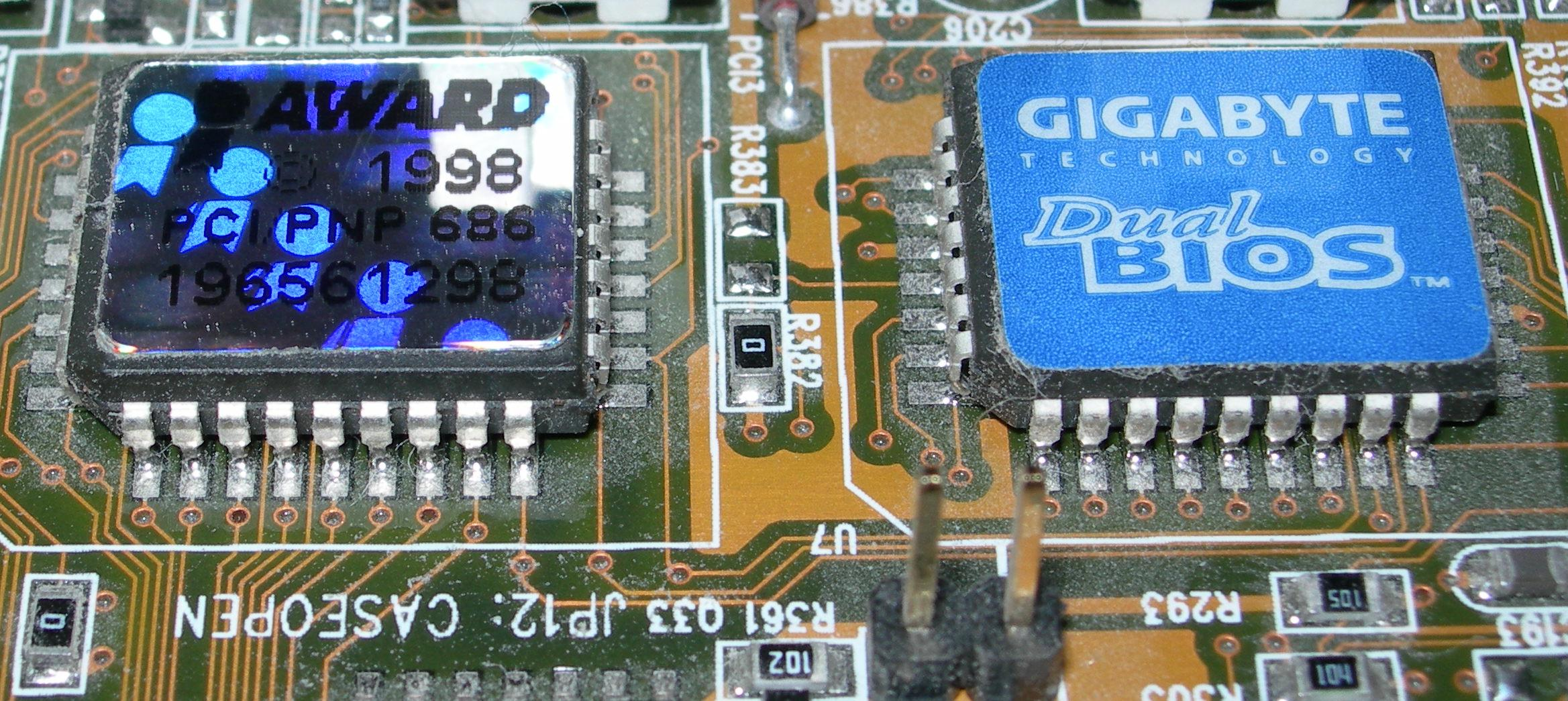 selbst Fotografiert Beschreibung: zwei QFJ/PLCC32 gelötet